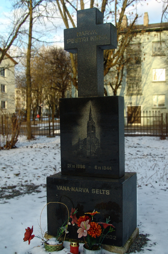 Гранитный крест с изображением церкви Св.Петра